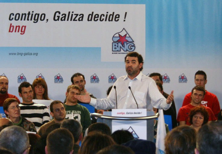 Mitin de Anxo Quintana (BNG) en Santiago de Compostela.